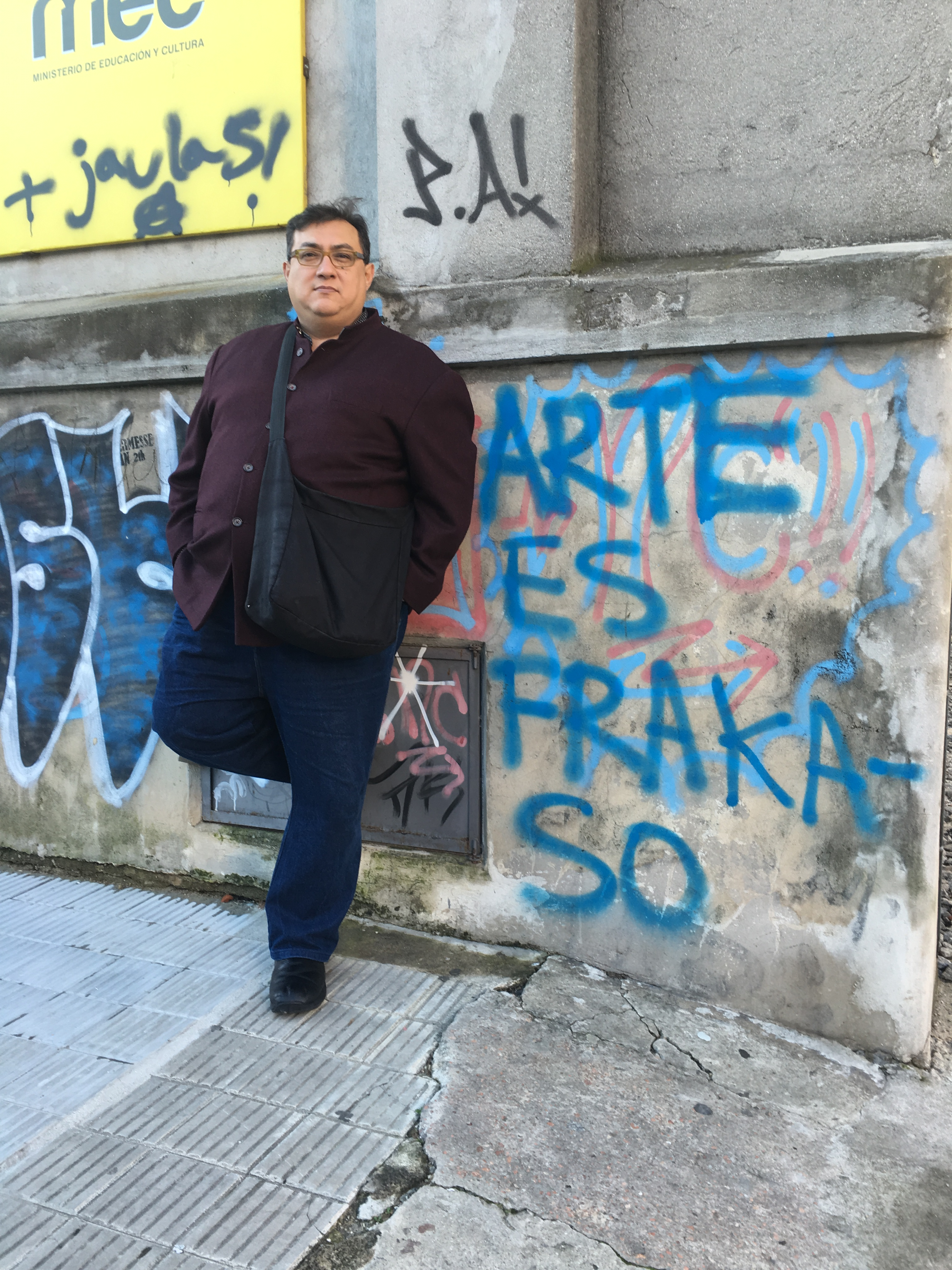 Foto Cuauhtémoc Medina Uruguay 2016